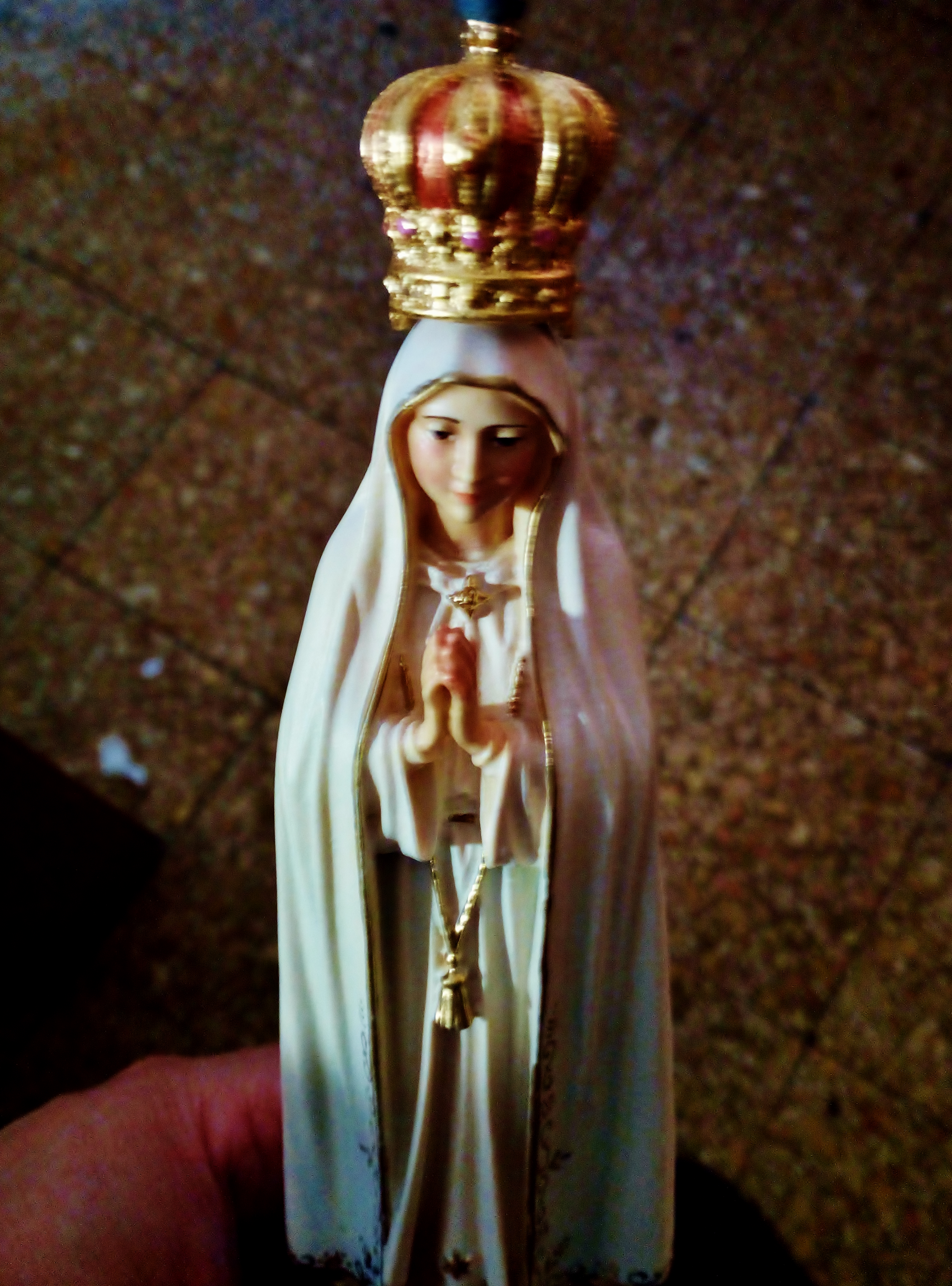 Scultura in legno della SS Vergine di Fatima (prov. Val Gardena)